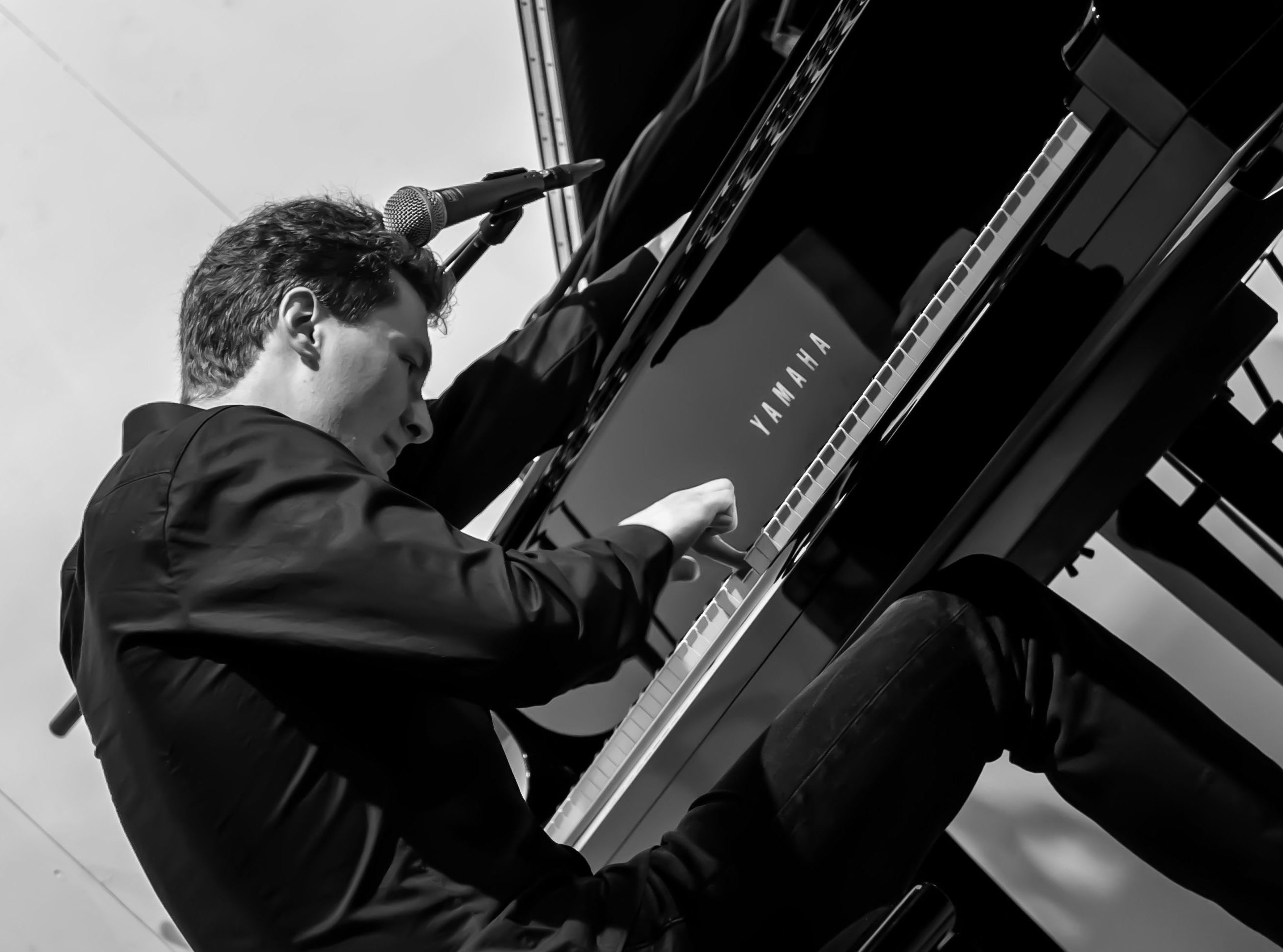 Dan Popek am Piano (Pressefoto)